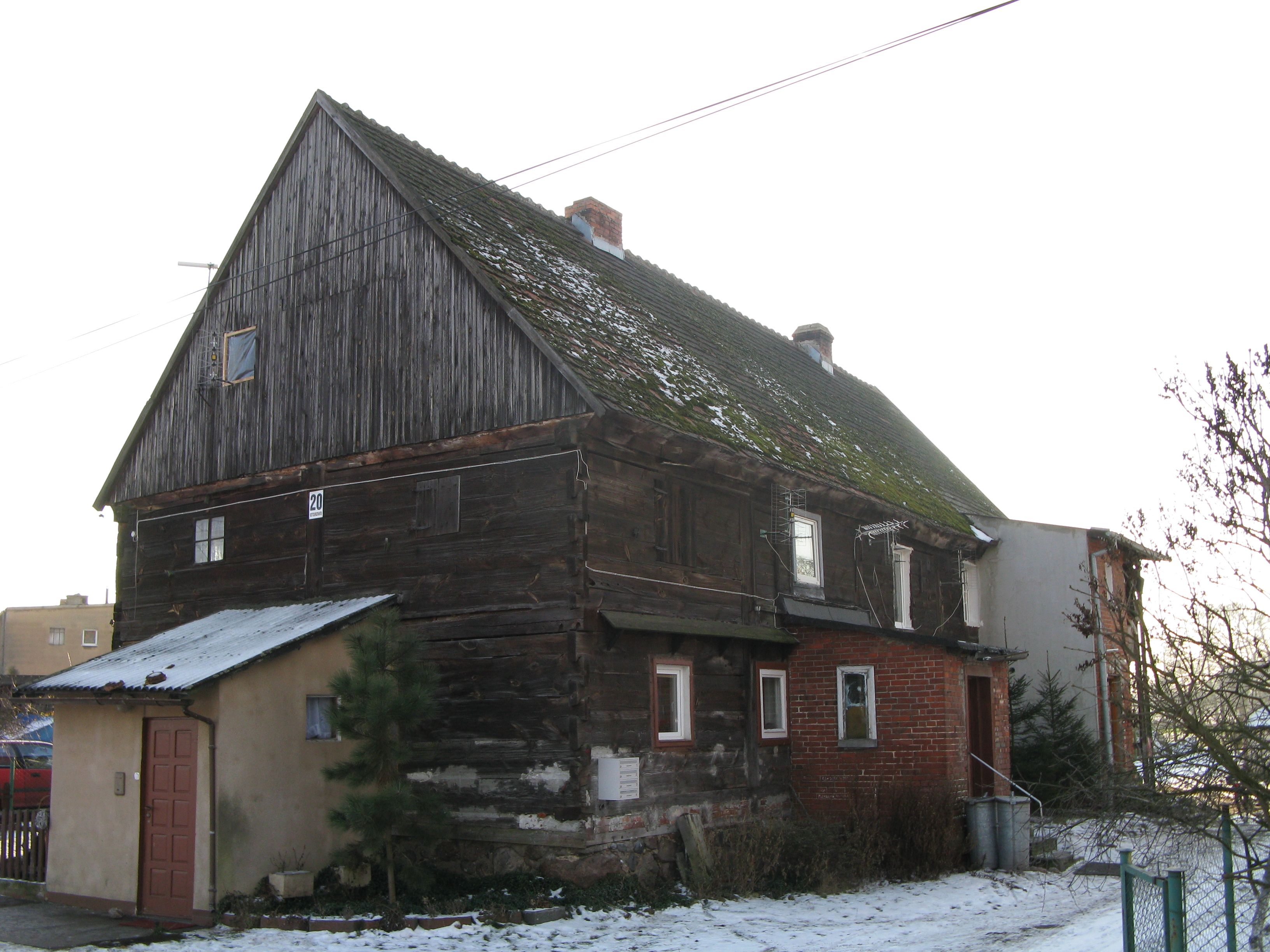 Budynek dawnego zespołu młyńskiego w Otorowie tzw Czarna Warszawa